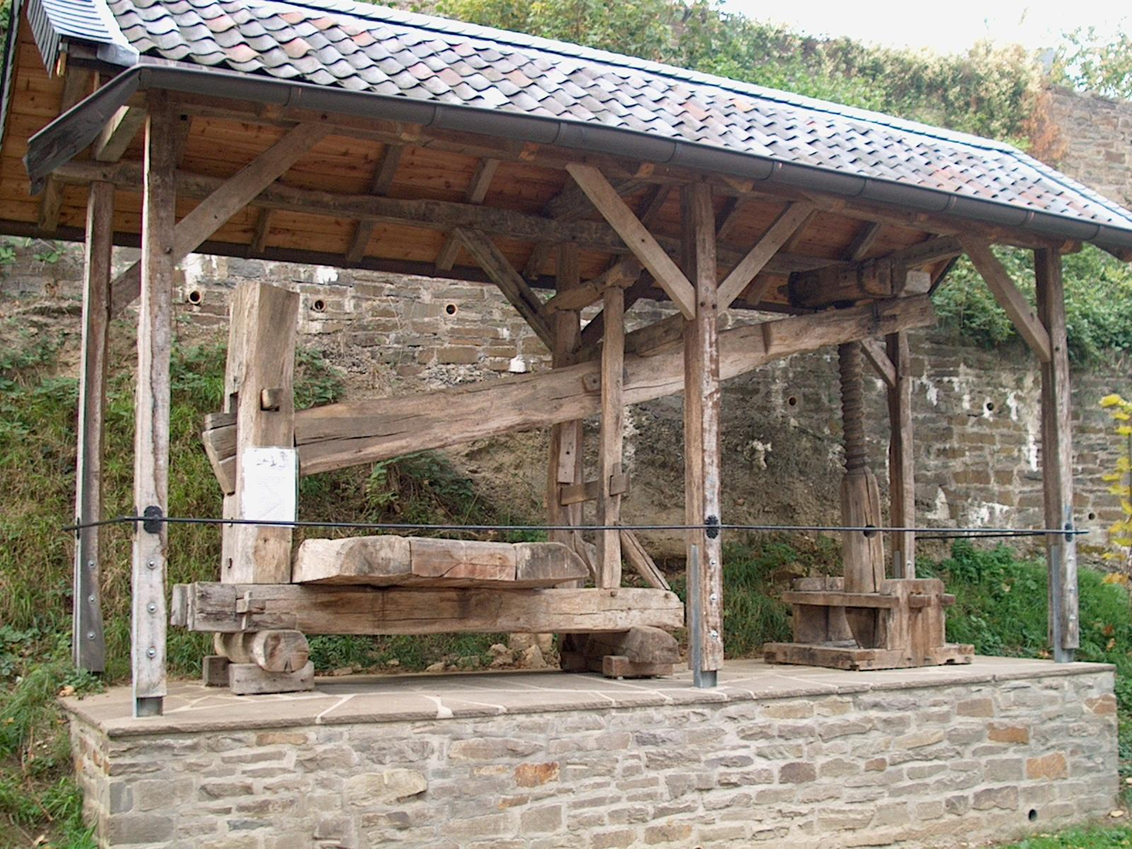 Baumkelter von 1620 in Stadt Blankenberg, Stadt Hennef (Sieg), Nordrhein-Westfalen